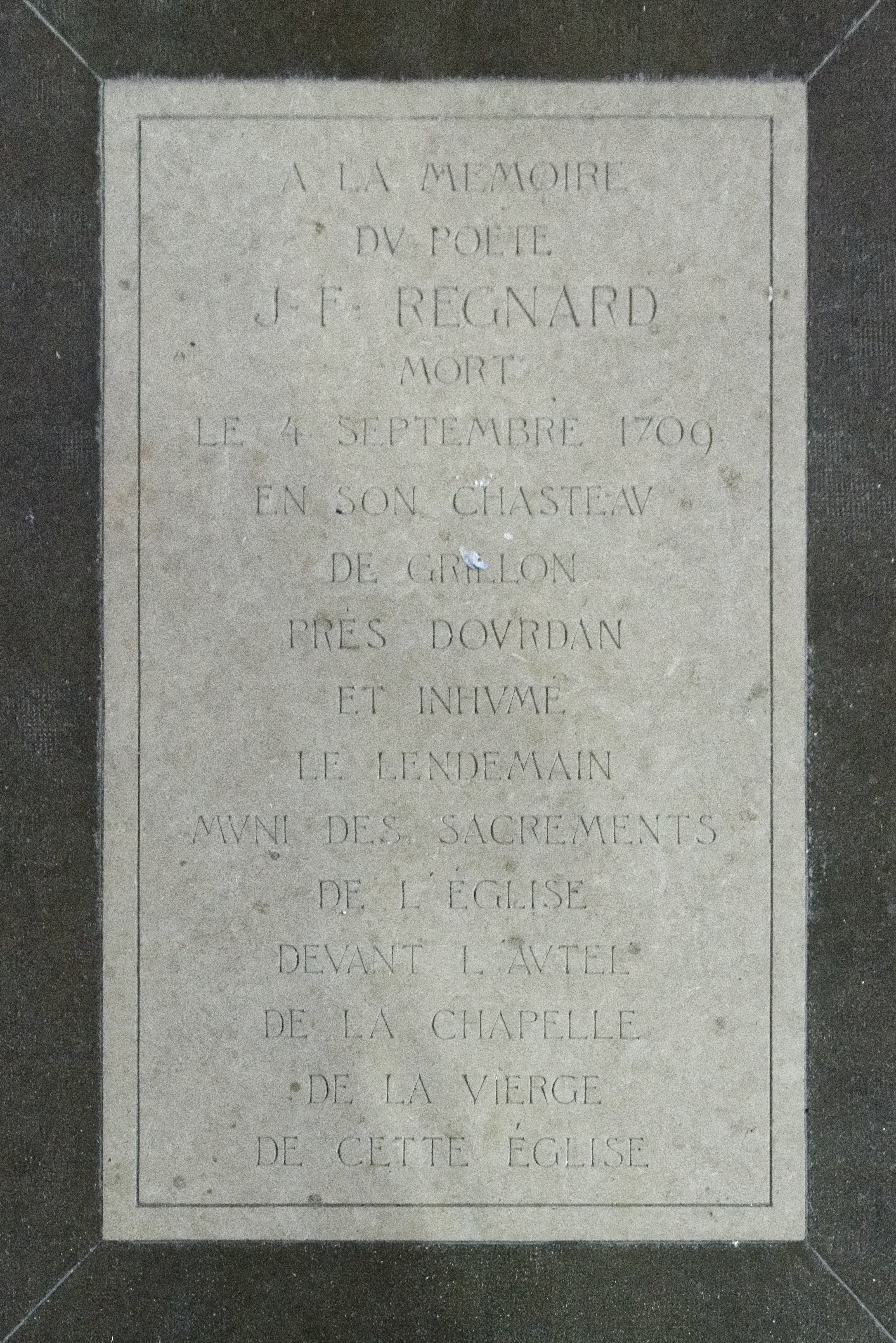 Plaque en mémoire de Jean-François Regnard, au pied de la chapelle de la Vierge de l'église Saint-Germain-d'Auxerre de Dourdan. Inscription : « À la mémoire du poète J-F Régnard mort le 4 septembre 1709 en son chasteau de Grillon près Dourdan et inhumé le lendemain muni des sacrements de l'Église devant l'autel de la chapelle de la Vierge en cette église. »